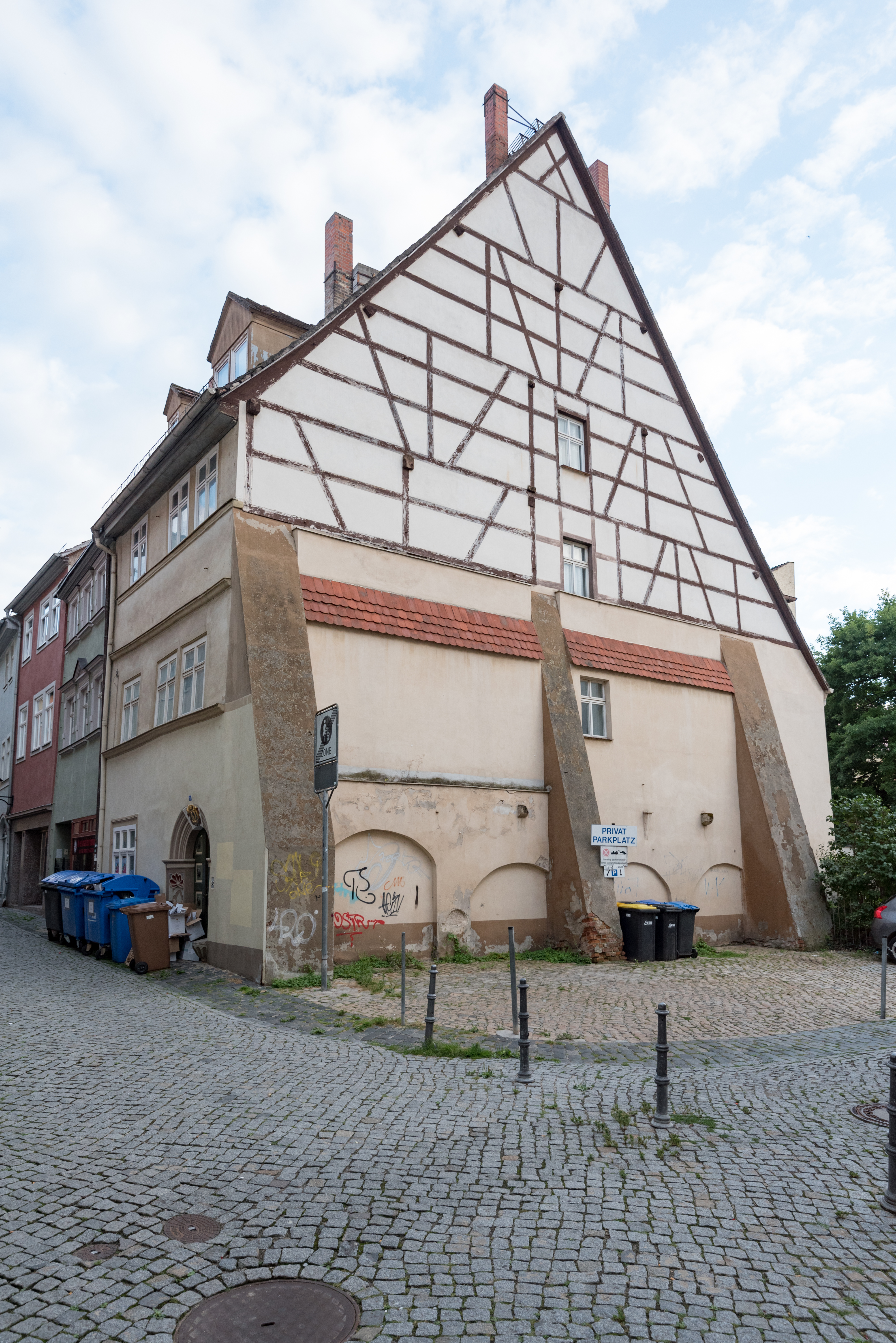 Naumburg (Saale), Engelgasse 9